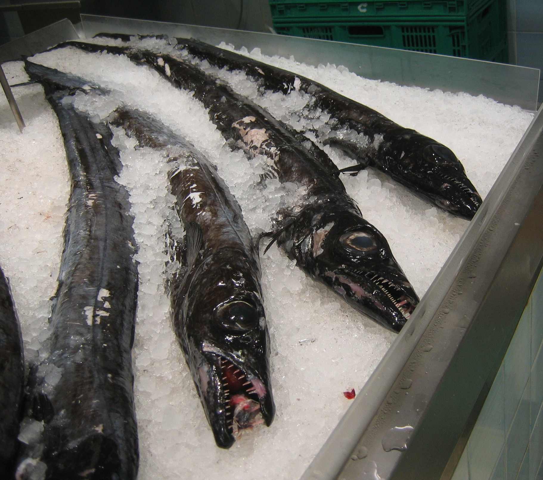 Espada in a supermarket on Madeira